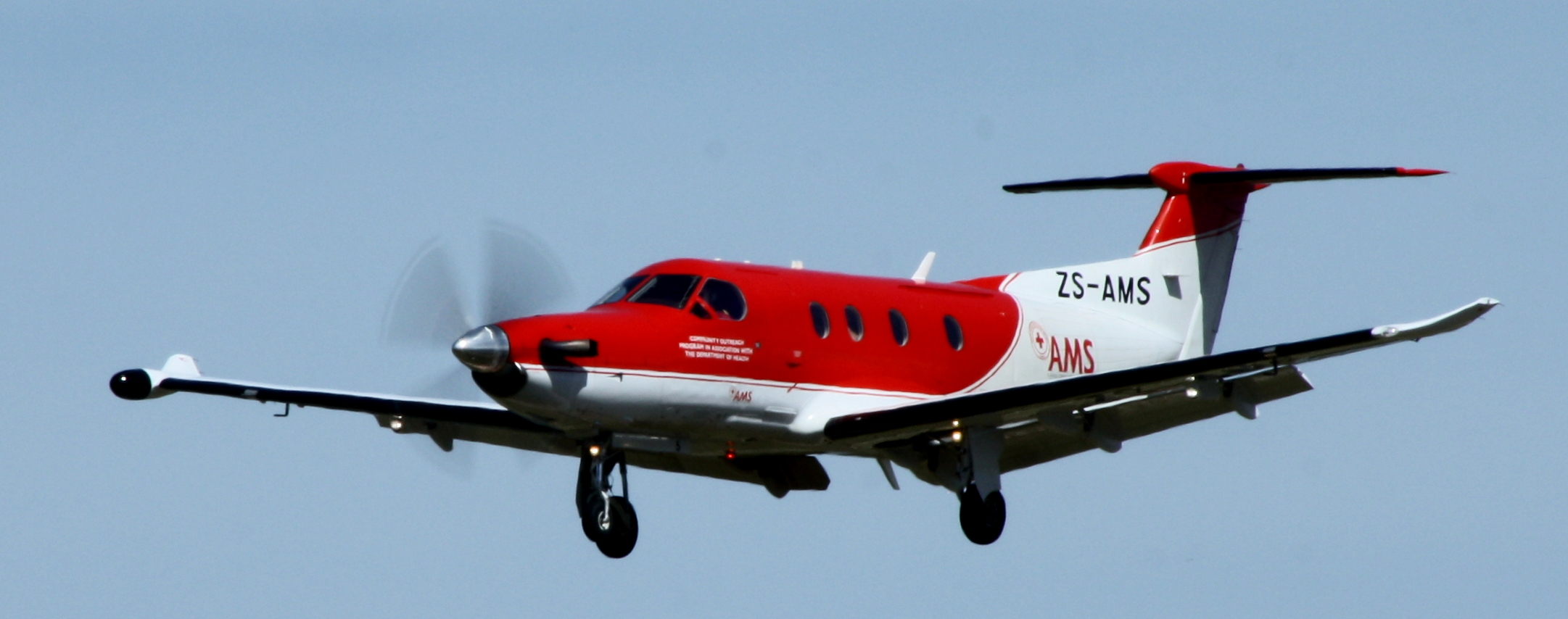 AMS Pilatus PC-12/47 ZS-AMS